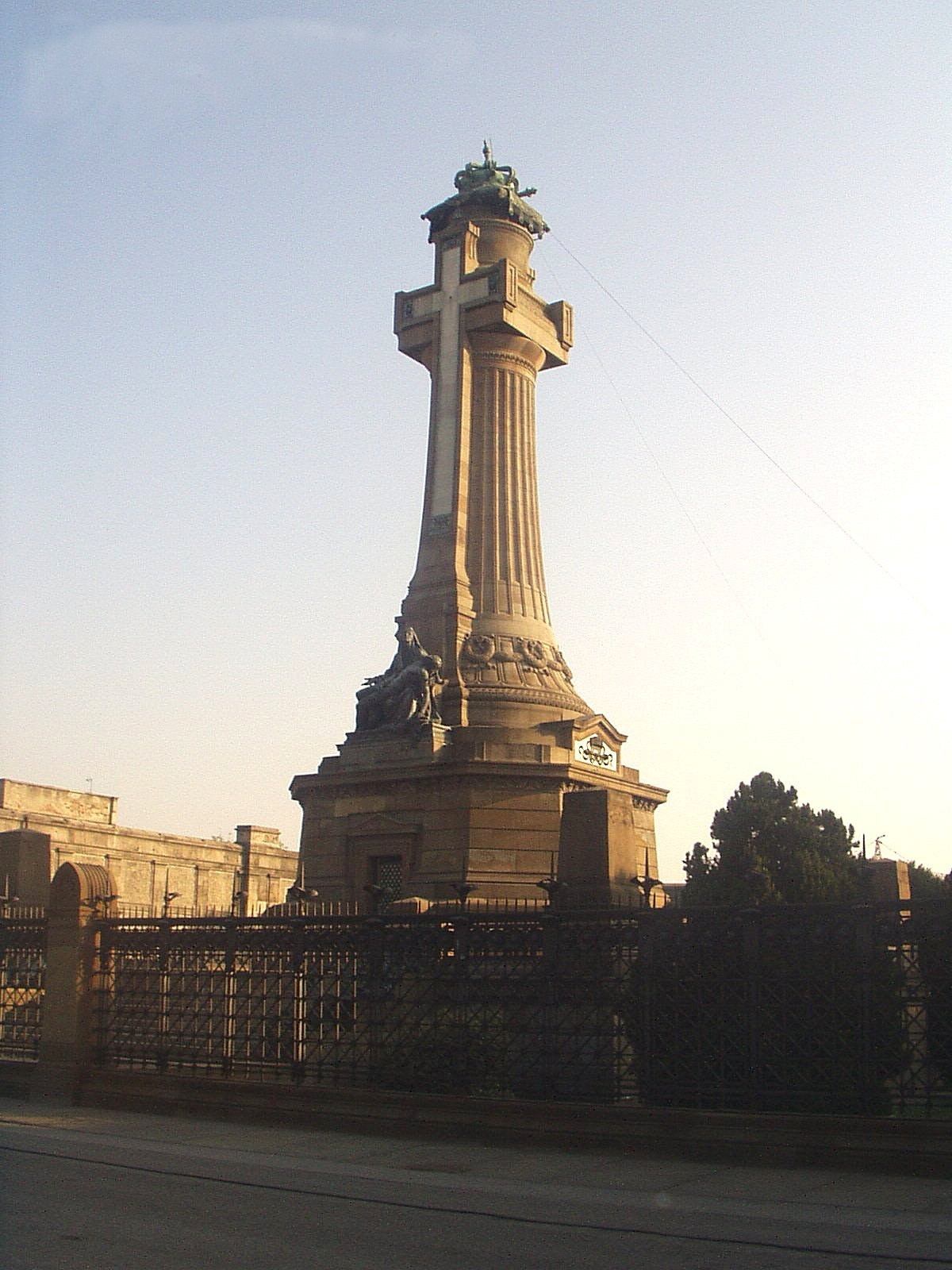 Cappella espiatoria